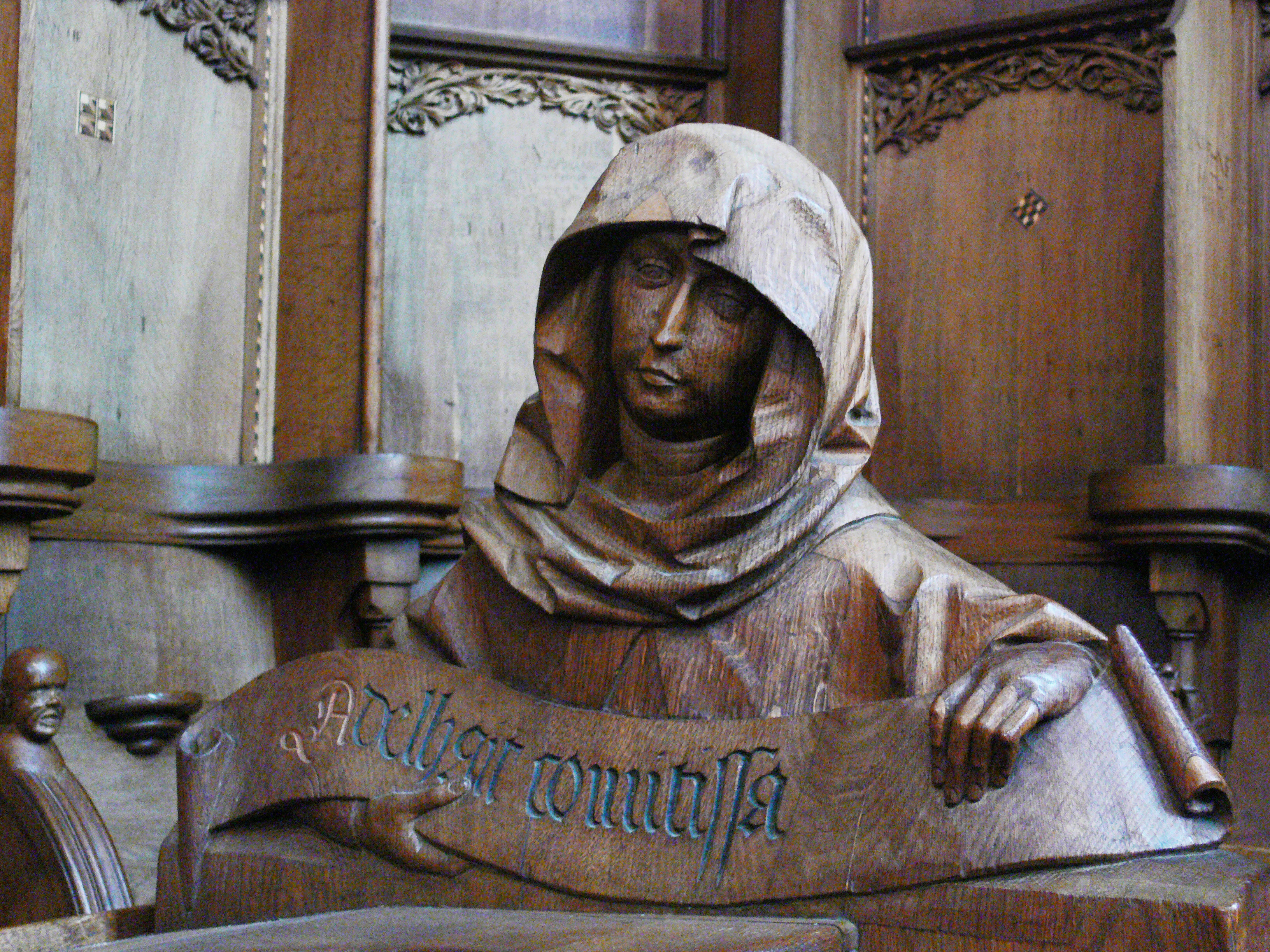 Kloster Blaubeuren, Klosterkirche, Chorraum Chorgestühl von Jörg Syrlin d. J., 1493 Stifterfigur Gräfin Adelheid („Adelhait comitissa“)